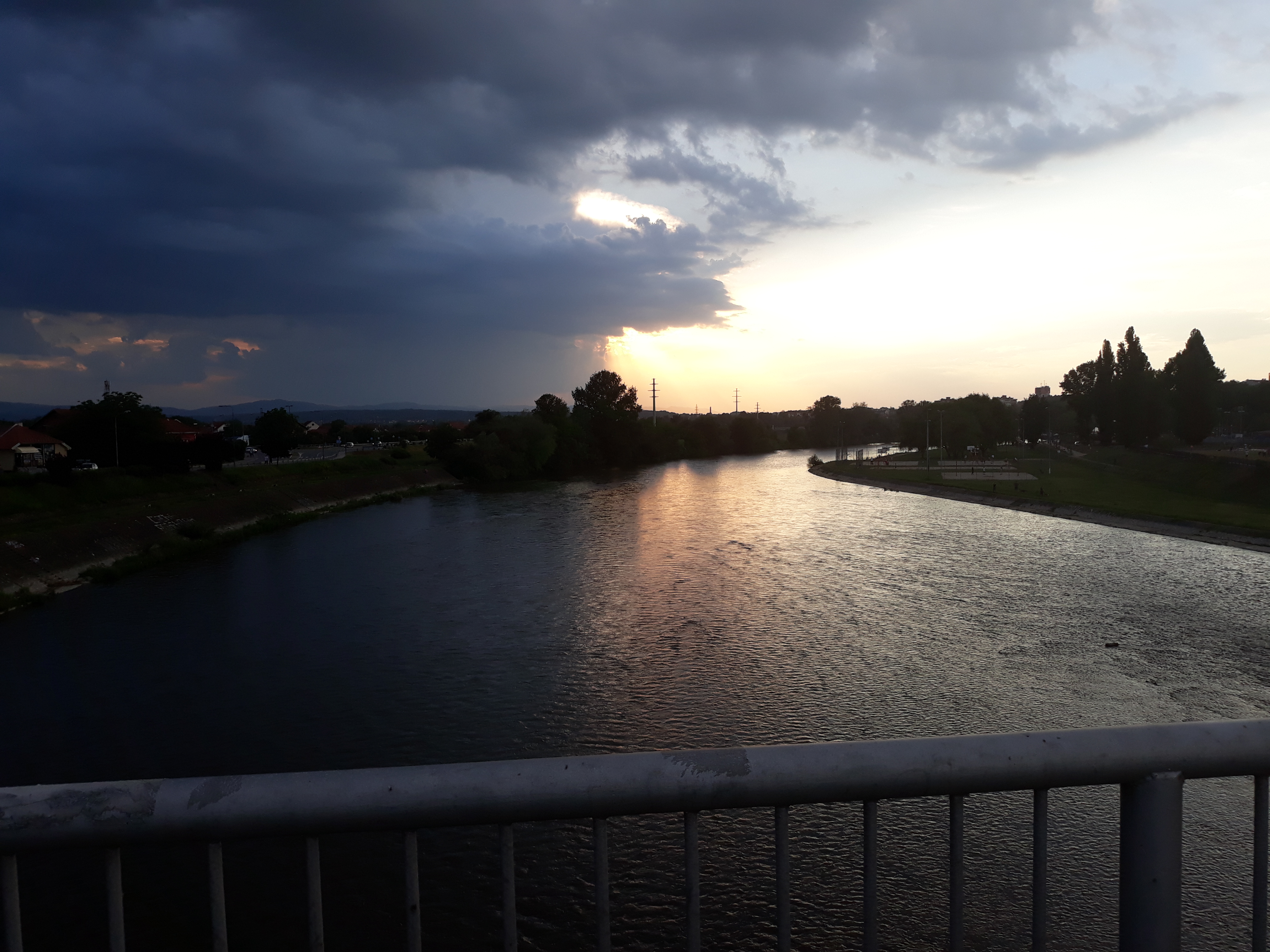 Поглед са ибарског моста у Краљеву